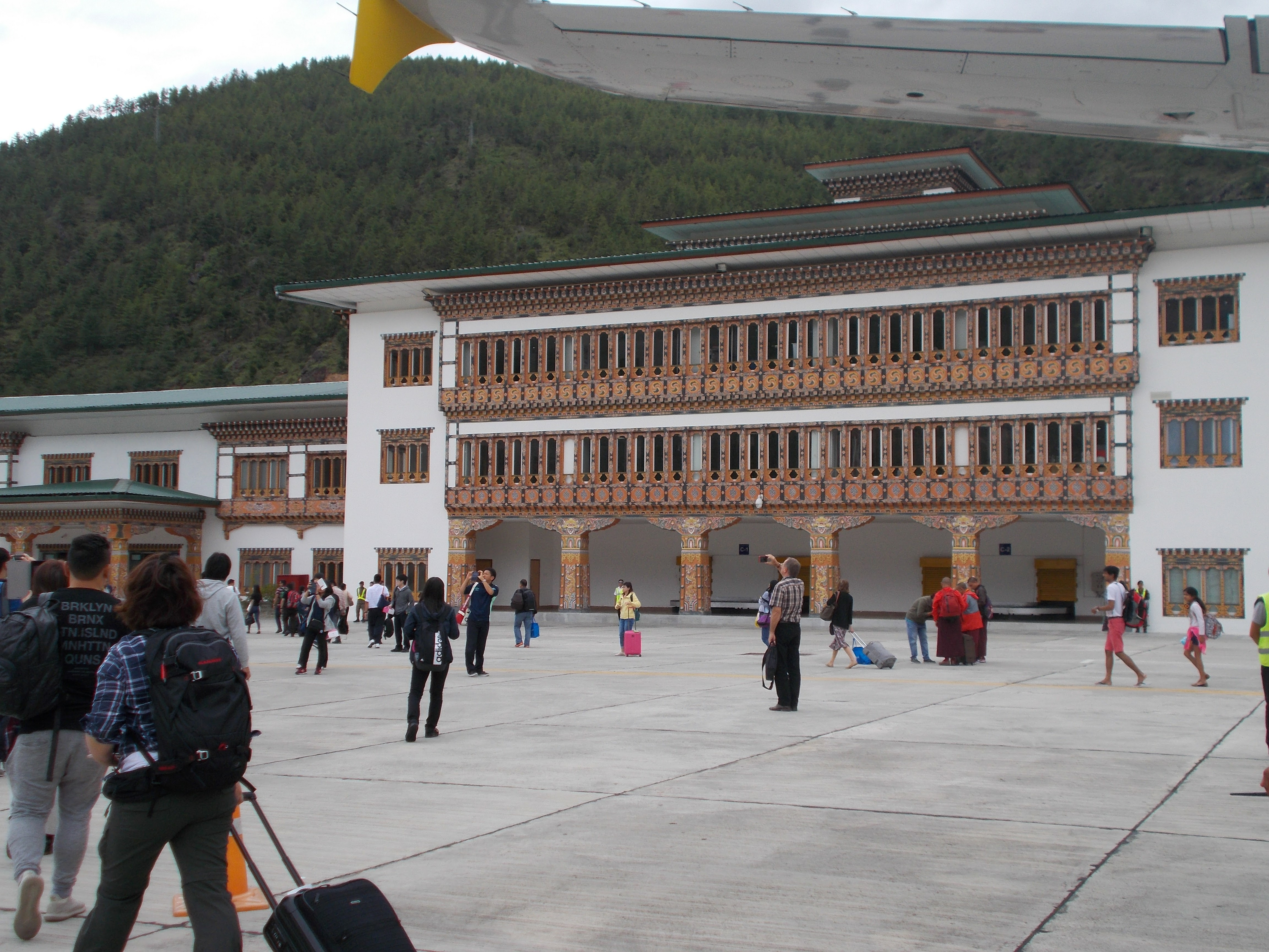 パロ空港の外観写真。駐機場側から入国口を見たもの。